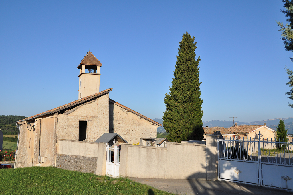 Chapelle et cimetière de Melve